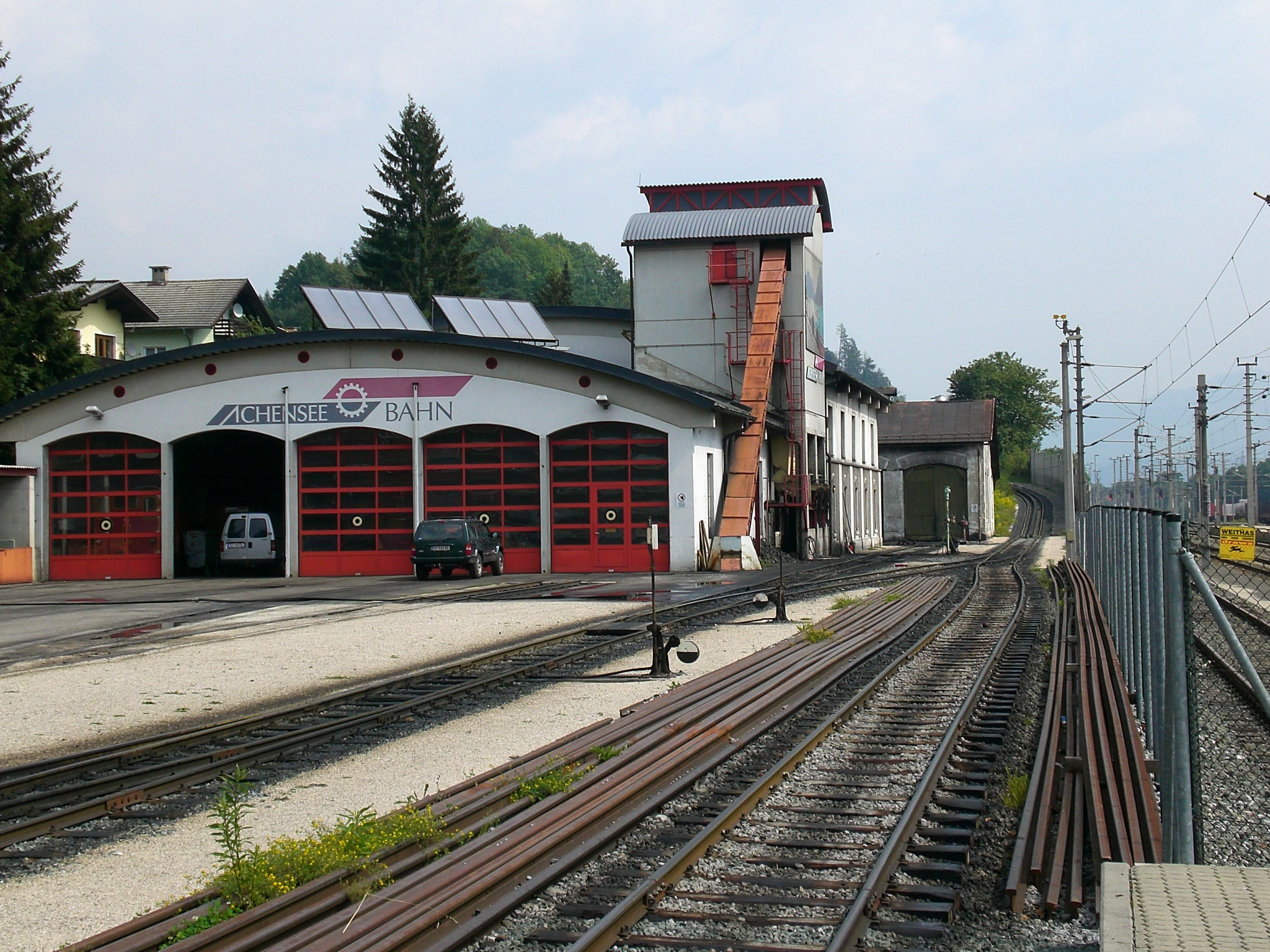 Remise der Achenseebahn im Bahnhof Jenbach. Rechts vom Gebäude beginnt der Zahnstangenabschnitt der Schmalspurbahn. This media shows the remarkable cultural object in the Austrian state of Tyrol listed by the Tyrolean Art Cadastre with the ID 16841. (on tirisMaps, pdf, more images on Commons, Wikidata)